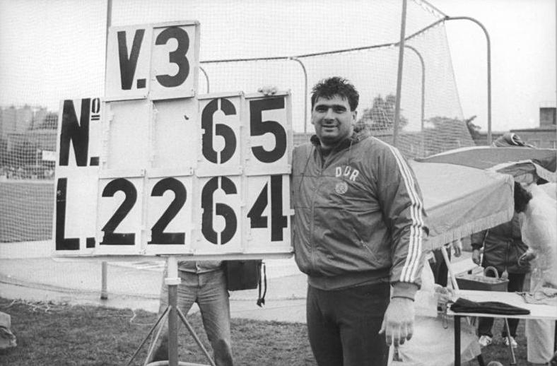 Udo Beyer ADN-ZB Kluge 20.8.86 Berlin: DVfL-Sportfest-Kugelstoß-Weltrekord- Der Potsdamer ASK-Sportler Udo Beyer stellte mit 22,64 m einen neuen Weltrekord im Kugelstoßen auf. Die bisherige Bestmarke von Ulf Timmermann (TSC Berlin) verbesserte er um zwei Zentimeter.